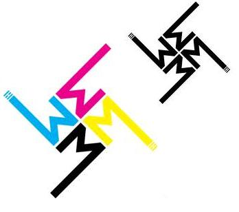 Marilyn Manson logo 2012, en sus dos versiones.